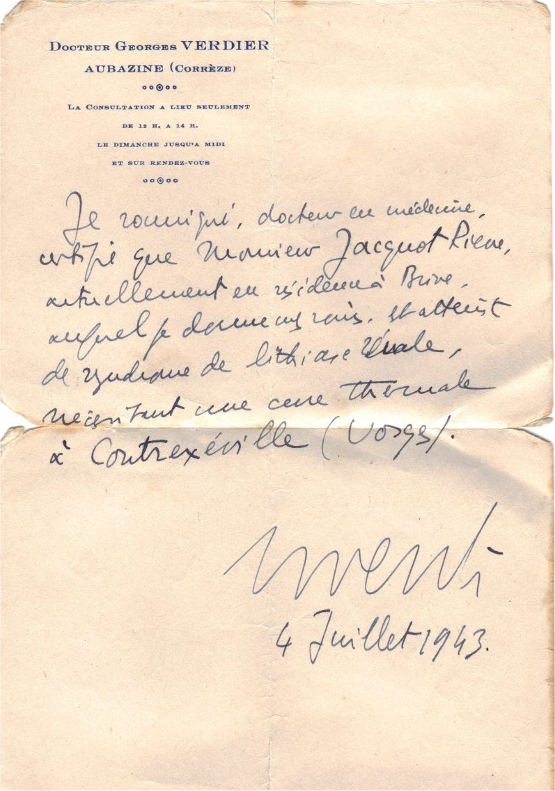 Faux certificat médical établi au nom de Pierre Elie Jacquot en 1943